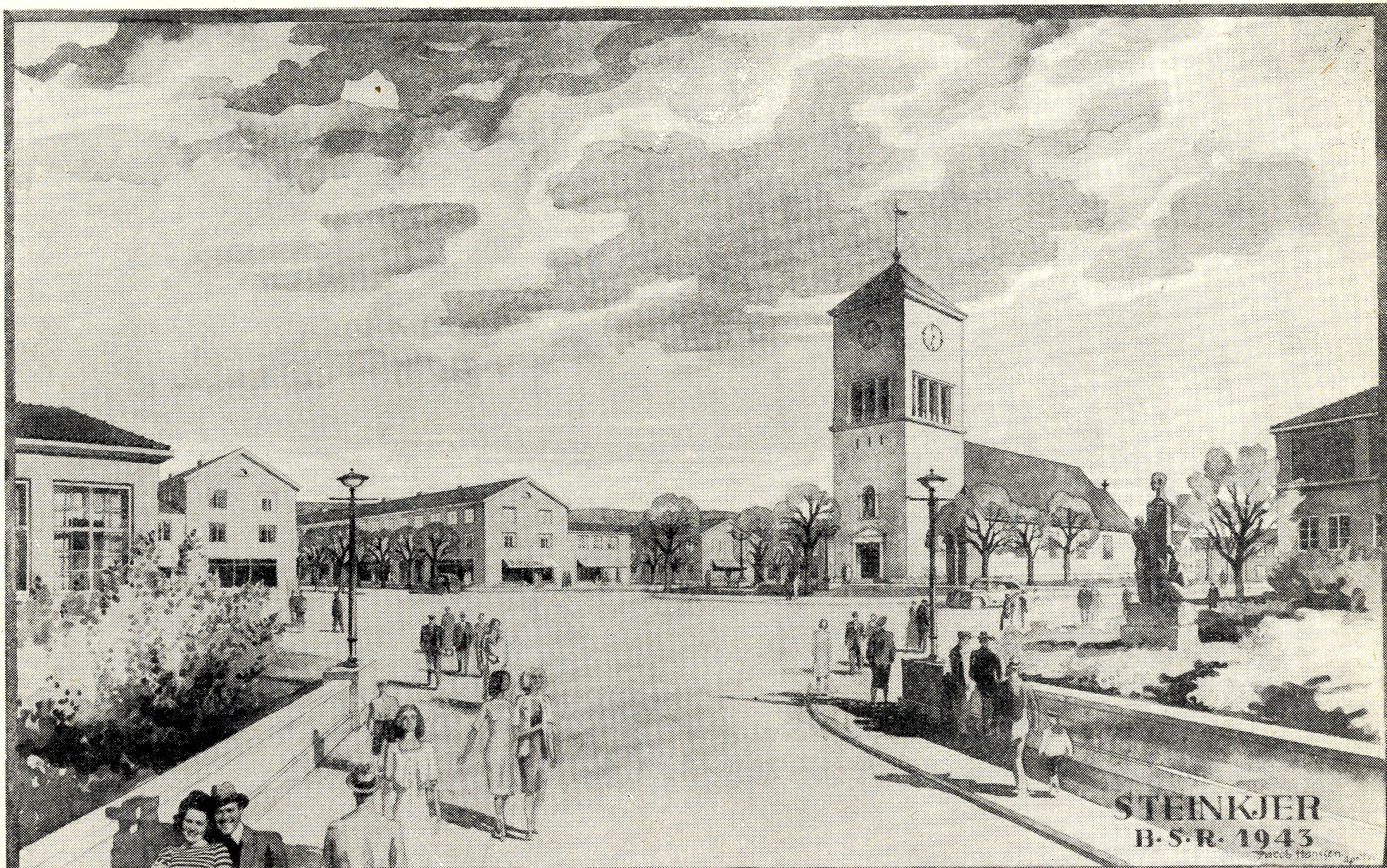 BSR v/Sverre Pedersen illustrerte reguleringsplanen for Steinkjer med en perspektivtegning. 1943